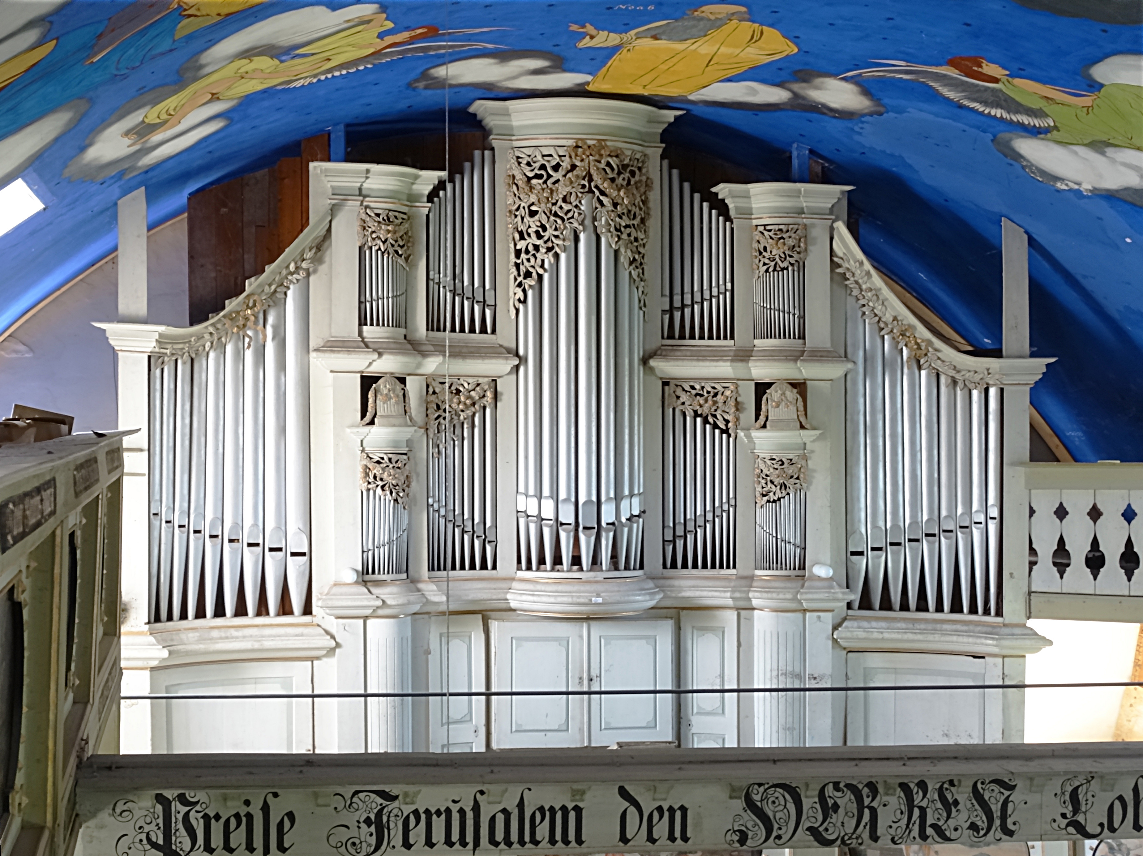 Orgel der Gebrüder Wagner (1800) in der Dorfkirche St. Laurentius Kirchheim [1]